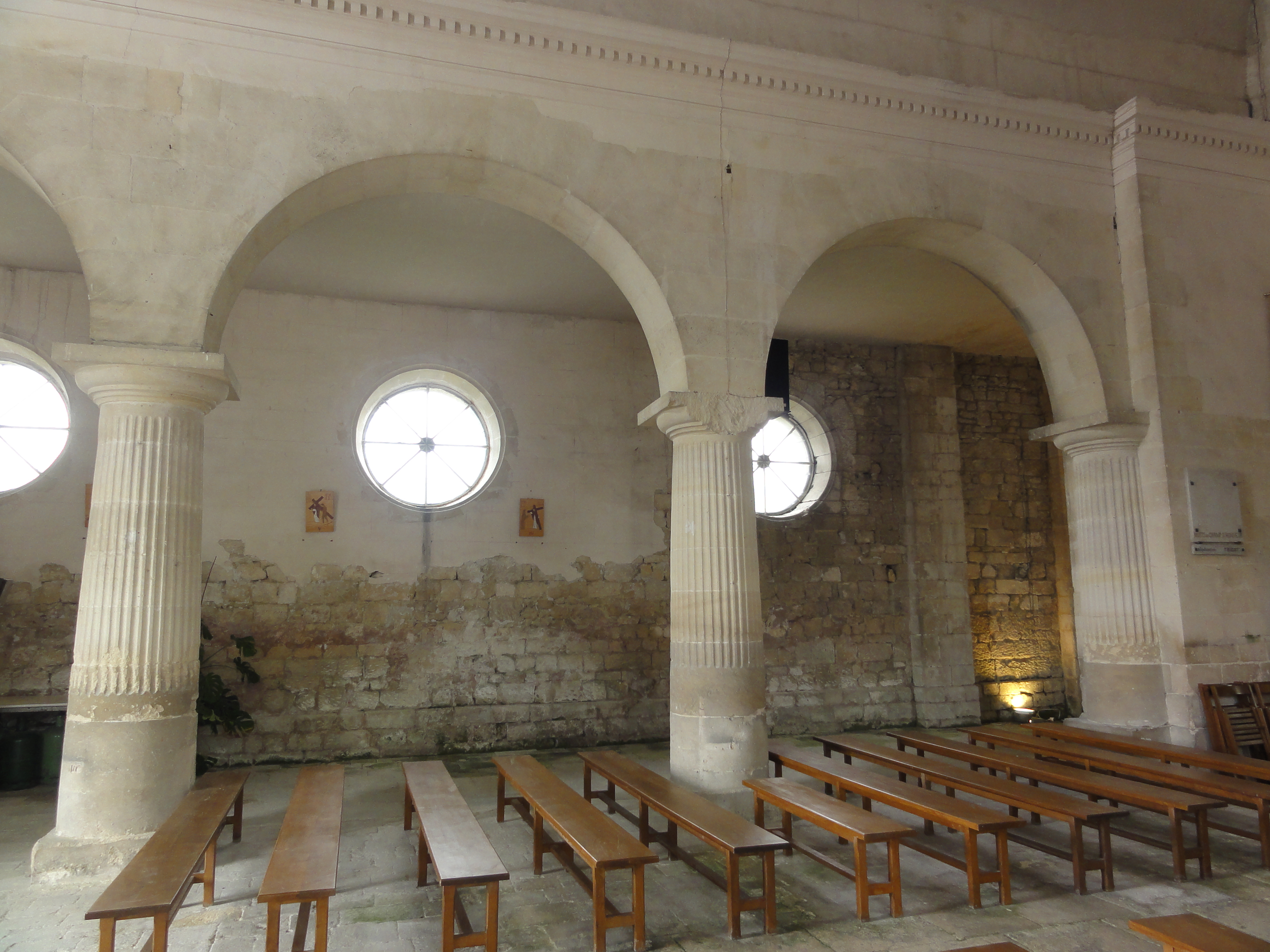 Église Saint-Paul-et-Saint-Rieul de Brenouille, intérieur